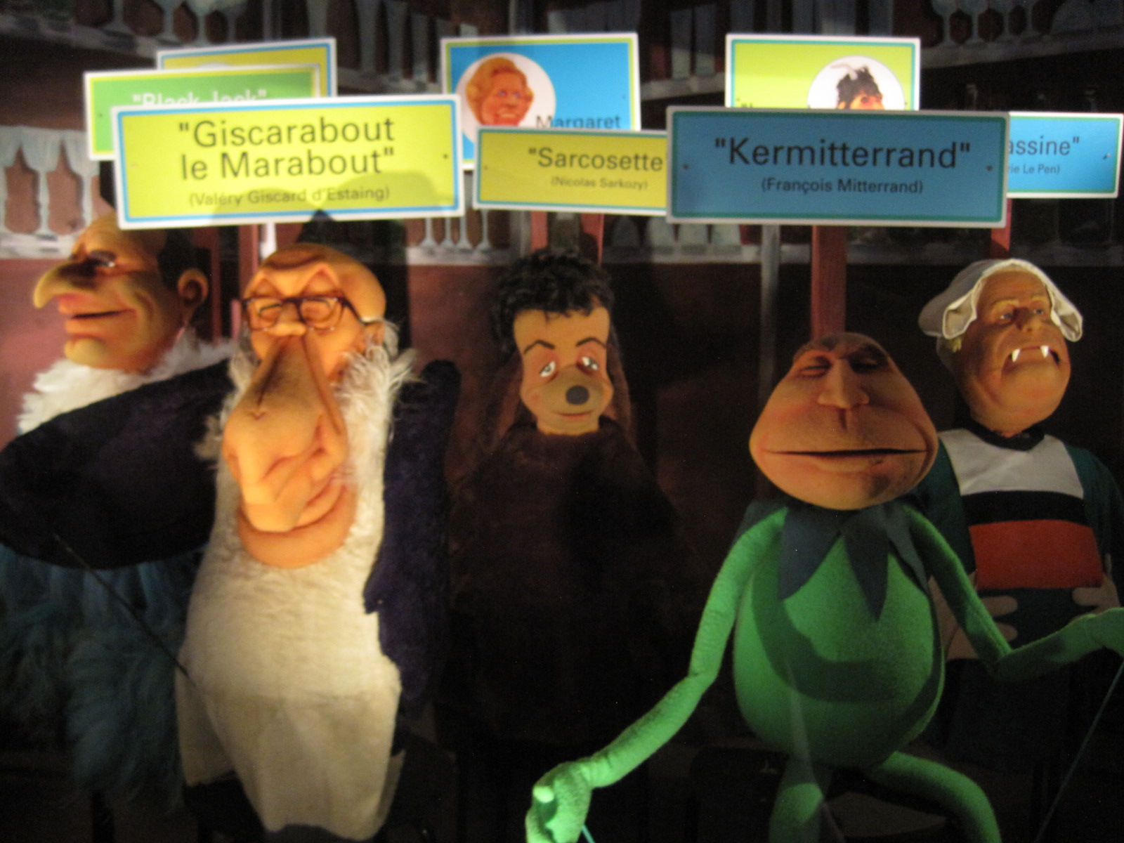 Le Bébête show - Exposition de marionnettes de la citadelle de Besançon